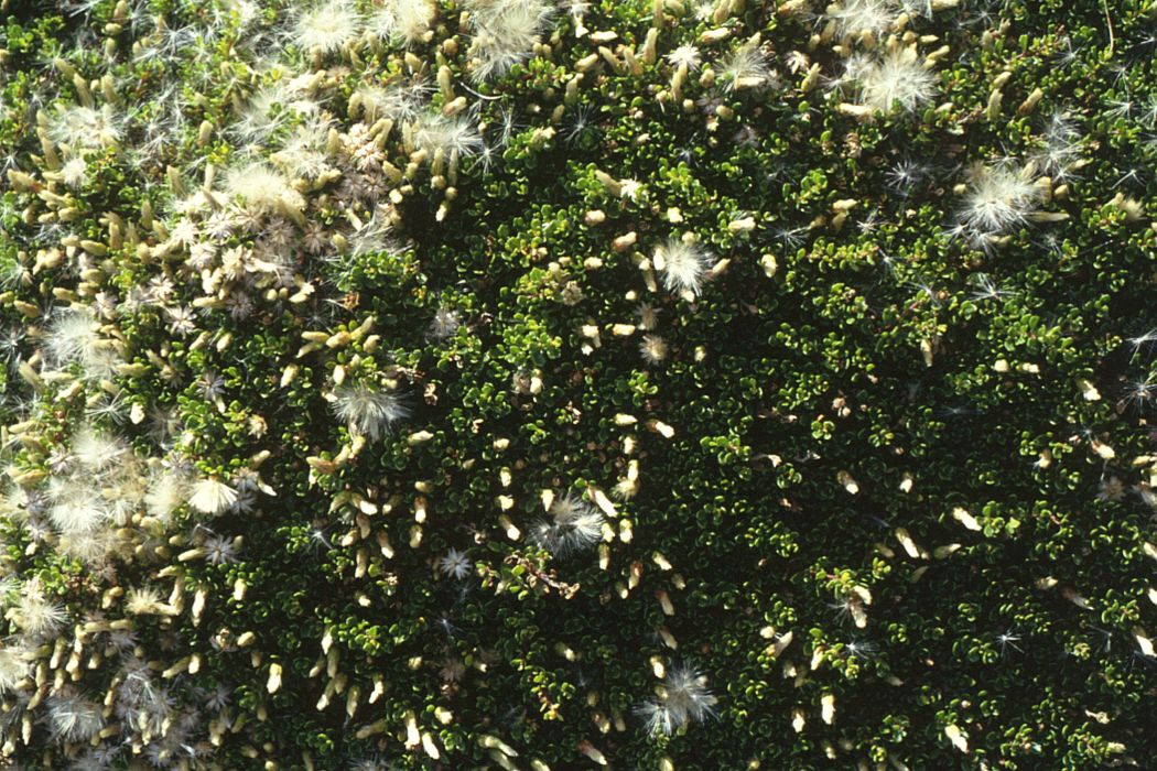 Baccharis tricuneata (= B. magellanica), Korbblütler (Asteraceae) - Chile, Parque Nacional Torres del Paine, bei Posada Río Serrano